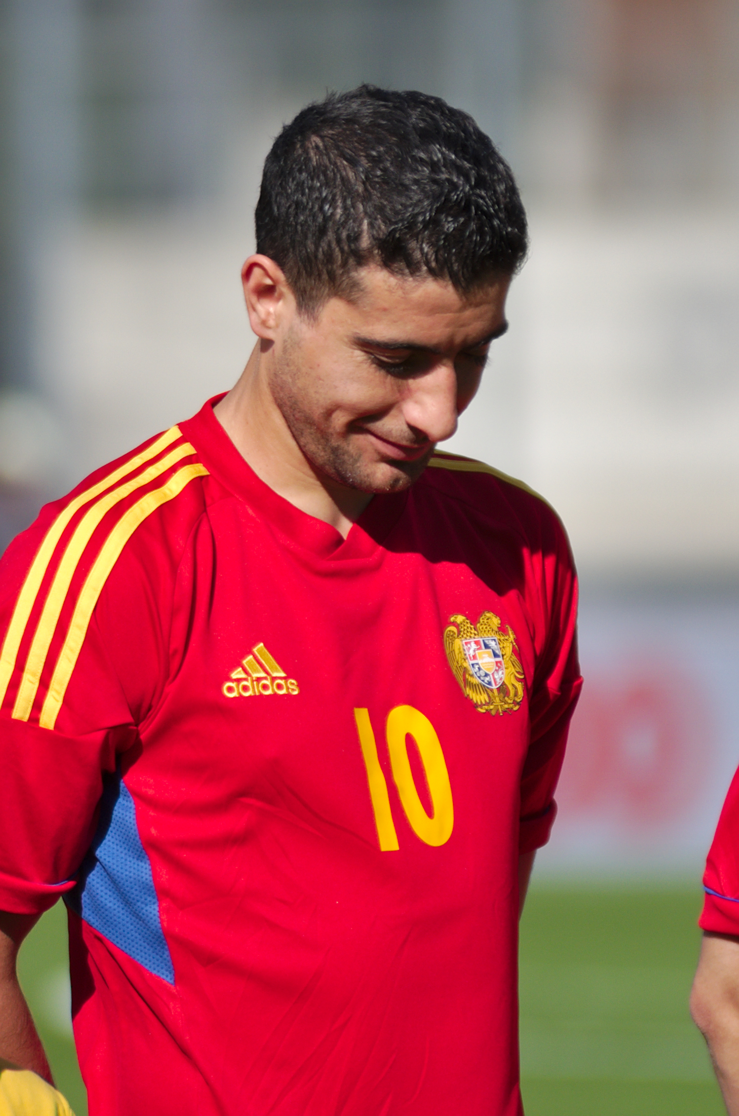 Algérie - Arménie - 20140531 - Gevorg Ghazaryan